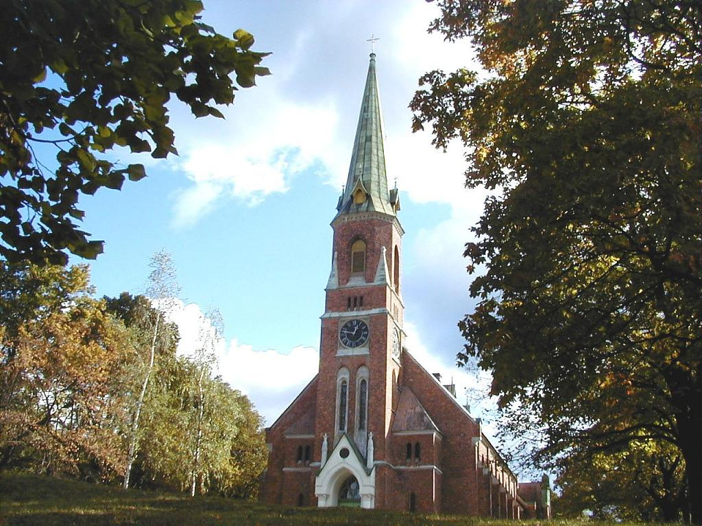 Rīga, Sv. Trīsvienības luterāņu baznīca 2002-09-28